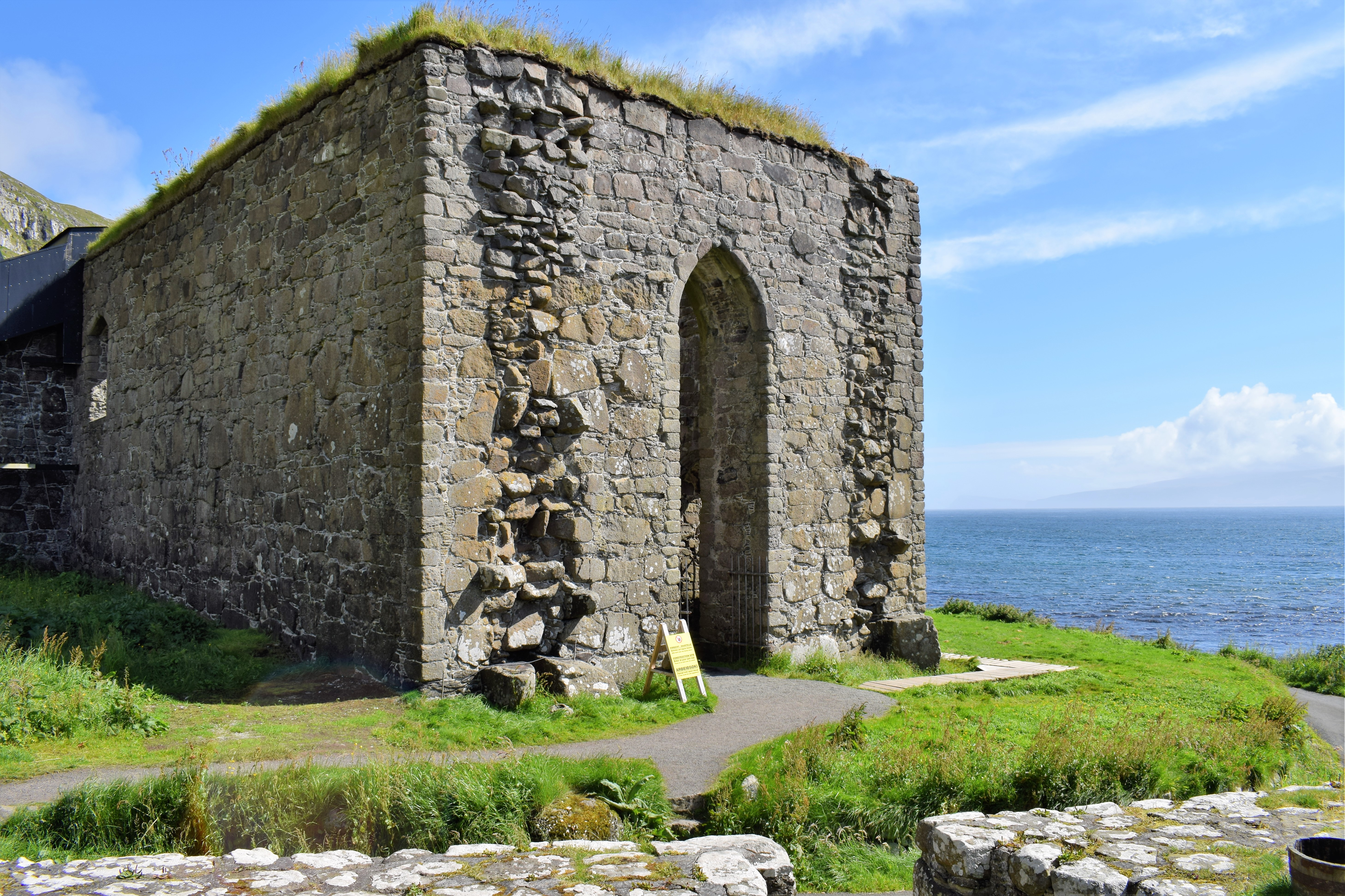 Føroyskt: Múrurin í Kirkjubø.